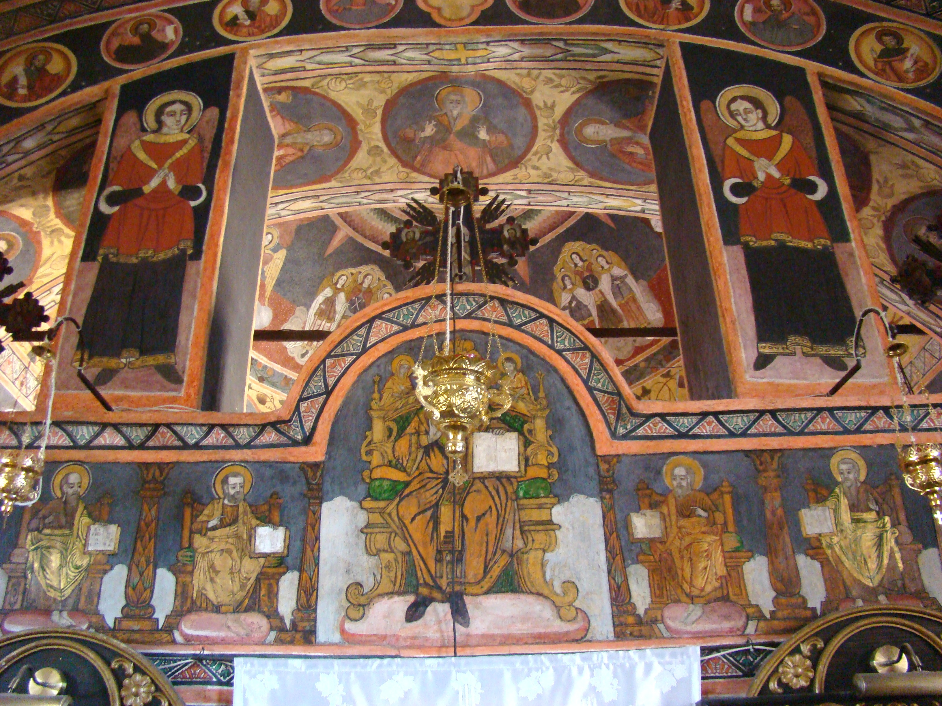 Biserica „Buna Vestire" din Jina, județul Sibiu